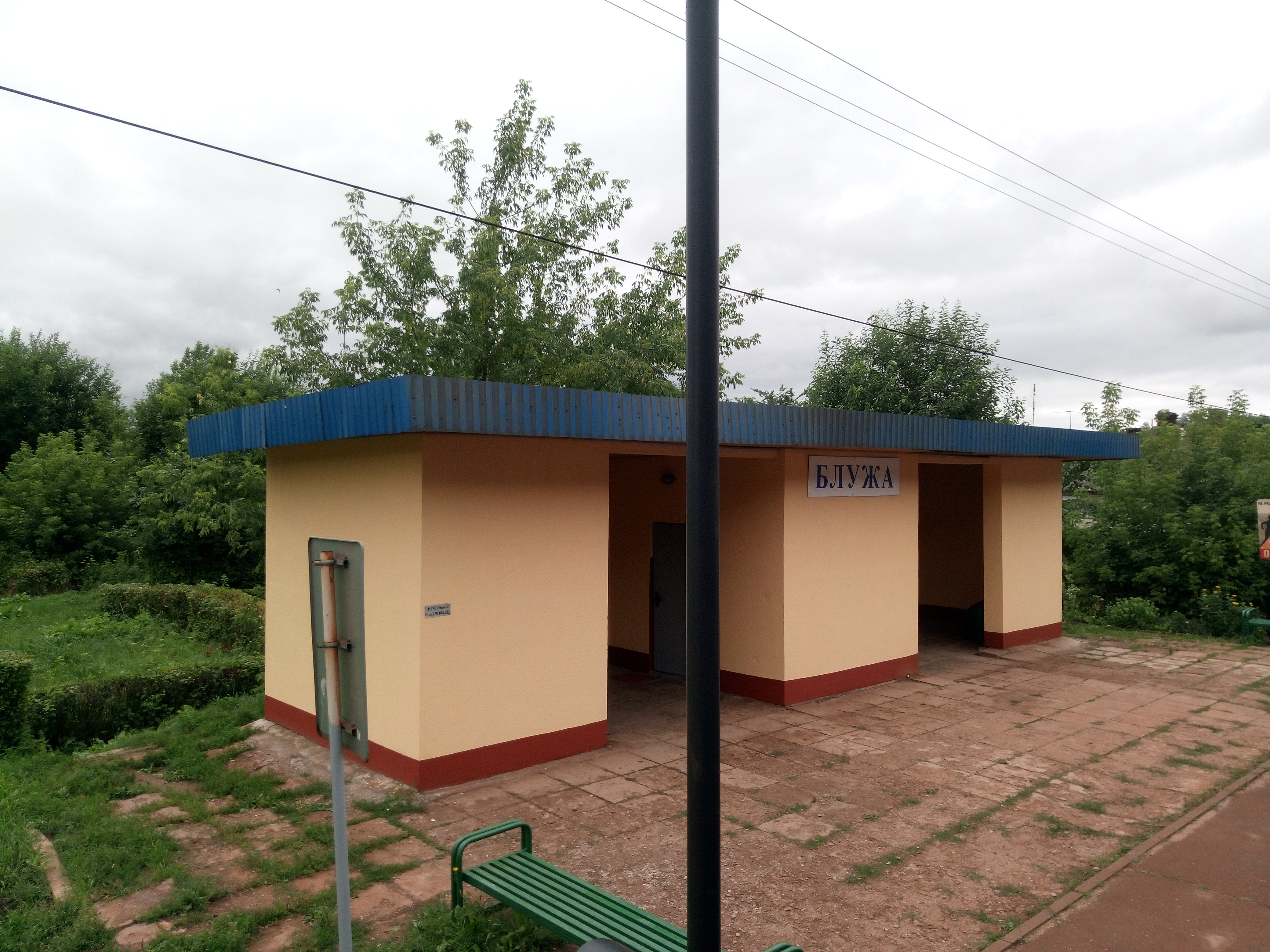 Блужа (прыпыначны пункт).